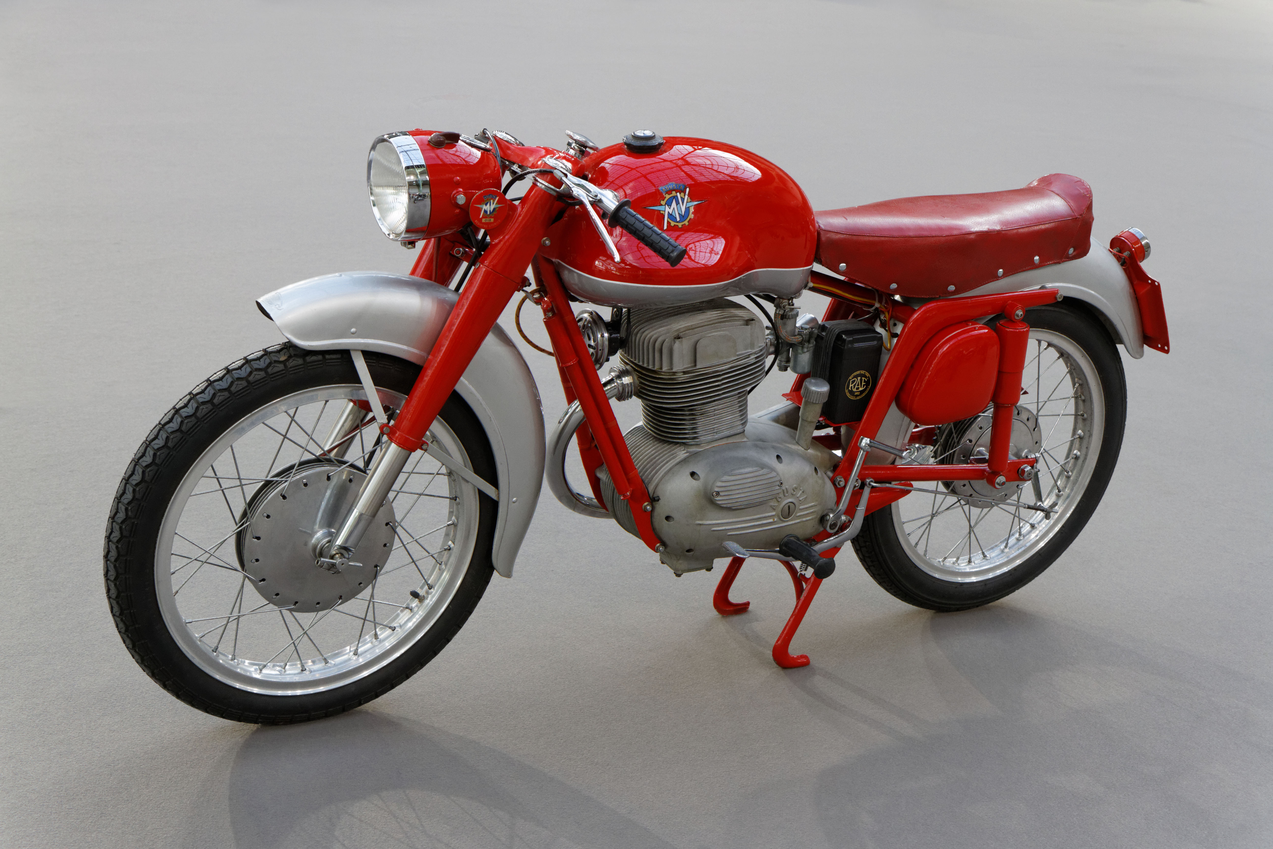 Une MV Agusta 175 CS Disco Volante au Grand Palais lors de la vente Bonhams en février 2014.